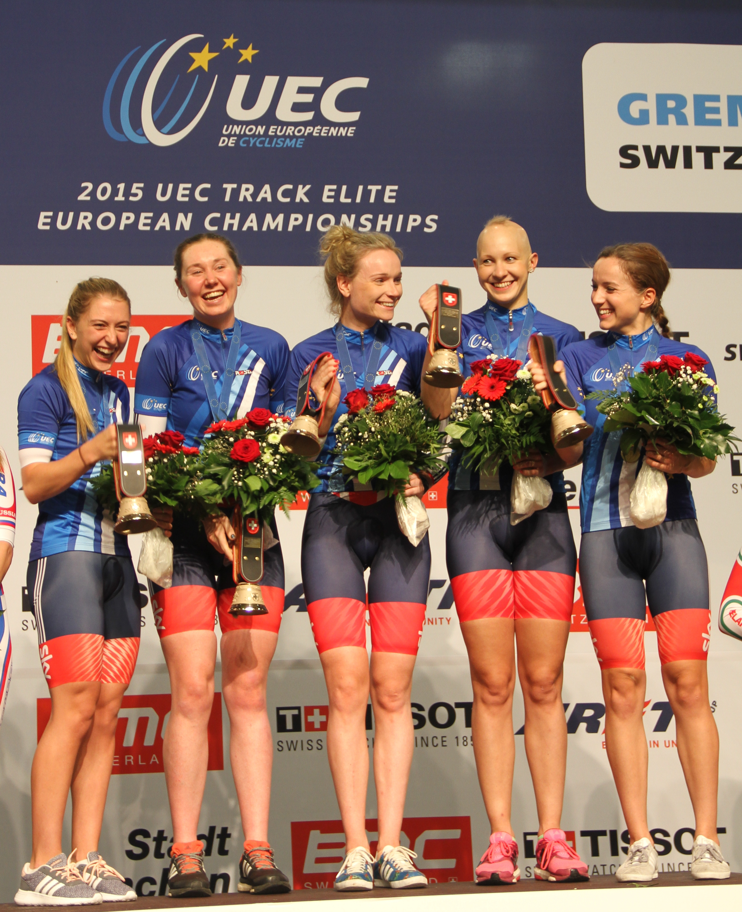 Britischer Frauen-Vierer, Europameister 2015 (v.l.n.r.): Laura Trott, Katie Archibald, Ciara Horne, Joanna Rowsell, Elinor Barker The making of this document was supported by the Community-Budget of Wikimedia Germany.